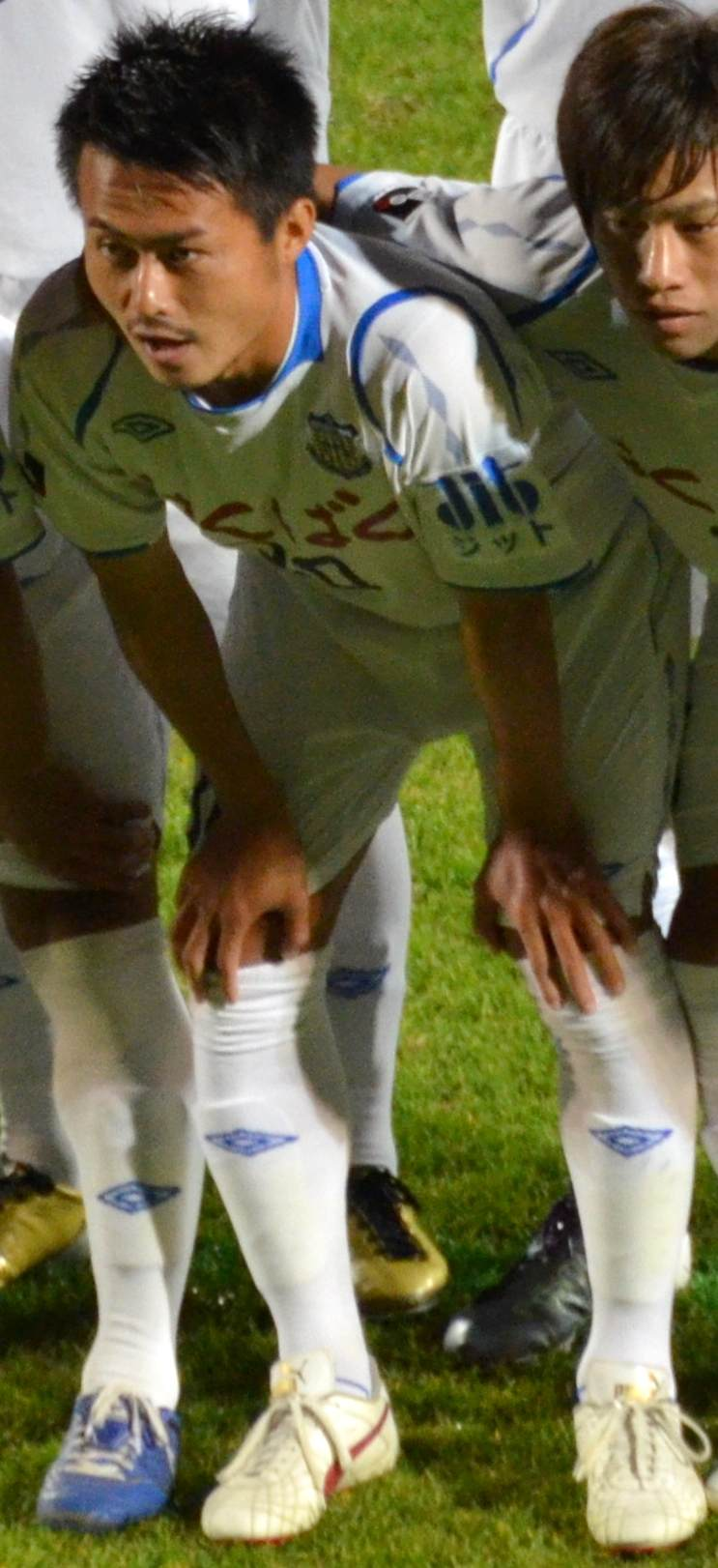 Kazunari Hosaka cropped from DSC_1758